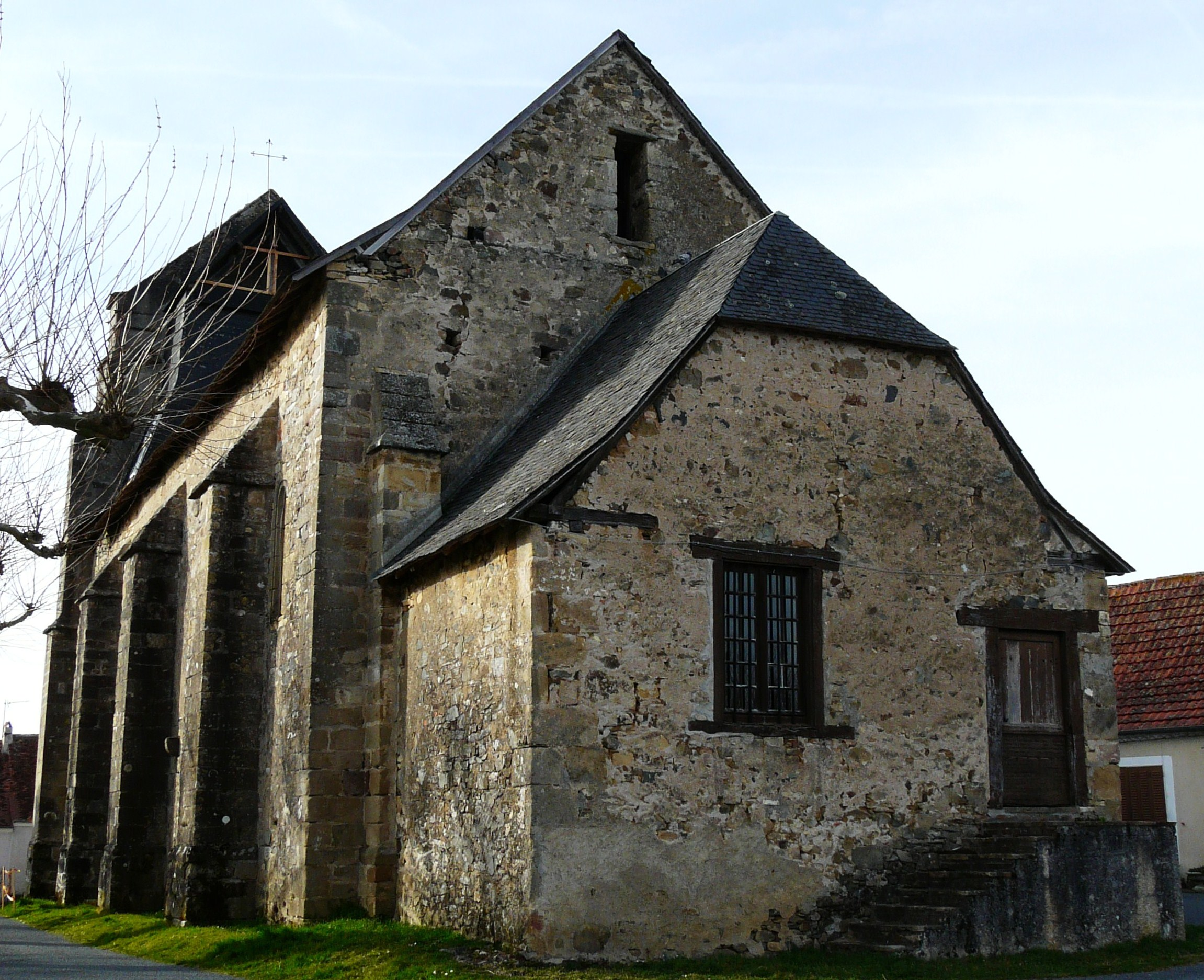 L'église Saint-Maximin, Saint-Mesmin, Dordogne, France. Vue prise depuis le sud-est.